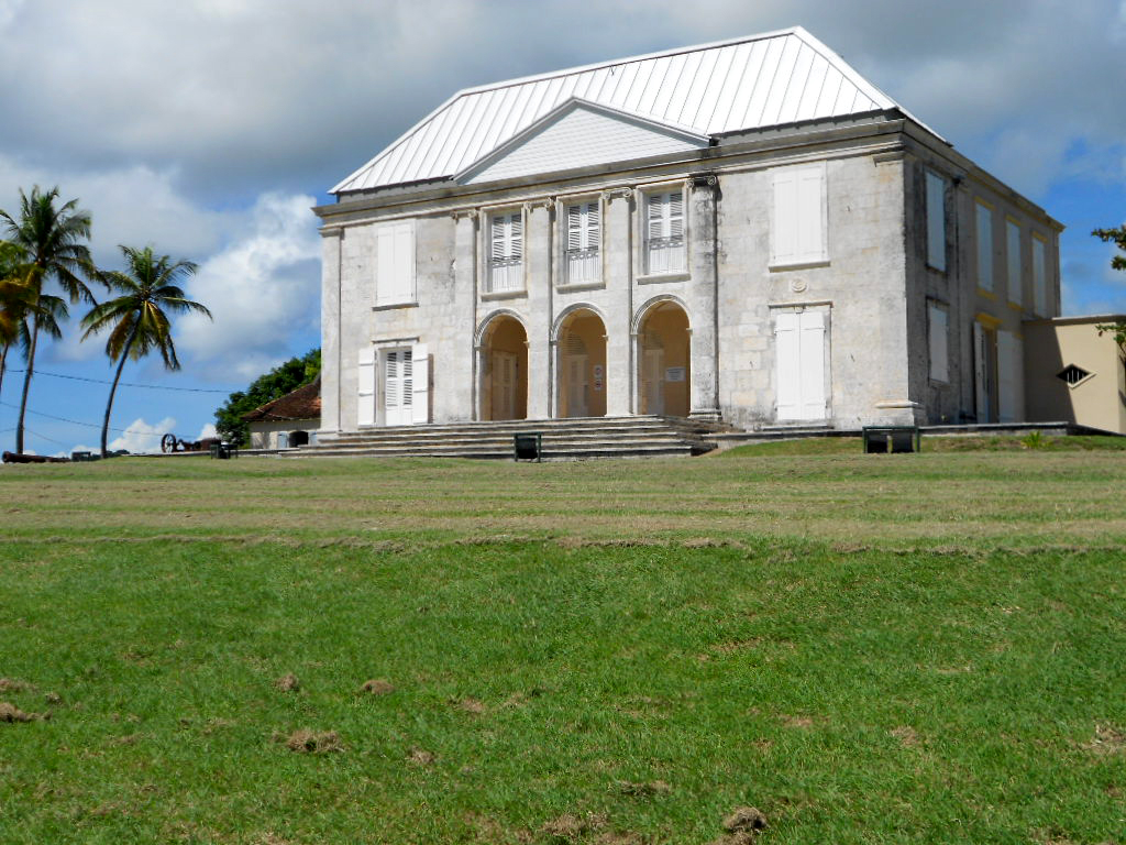 La maison de maître a été rénovée et permet aujourd'hui de découvrir les collections permanentes